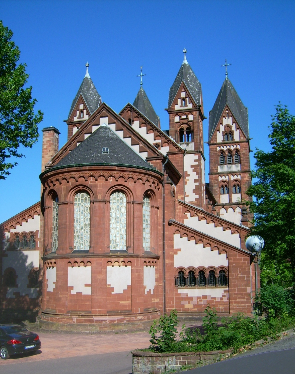 Kirche St. Luitwin in Mettlach